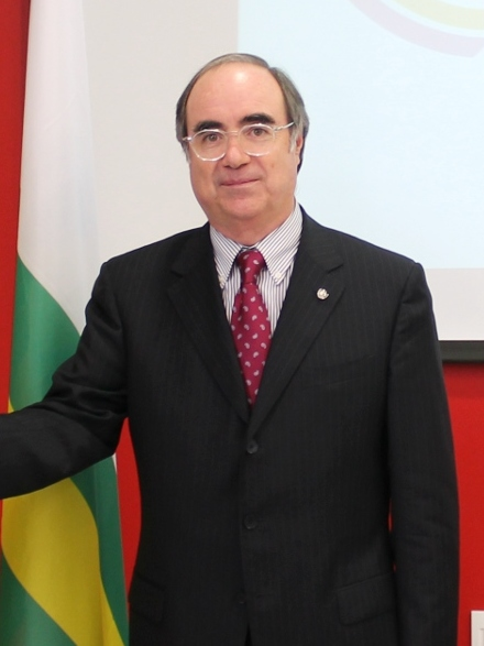 El regidor d'esports de l'Ajuntament de Sabadell, Josep Ayuso amb el president de la Federacio Catalana d'Atletisme Joan Villuendas a la Pista Coberta